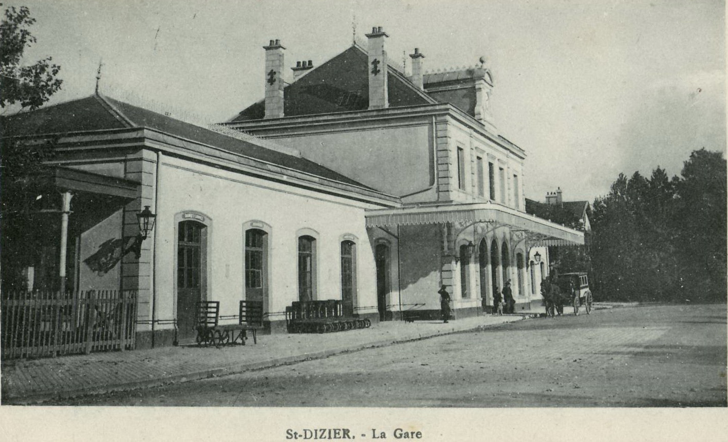 Détail de la carte postale ancienne éditée par la Librairie Jeanne-d'Arc à Saint-Dizier : SAINT-DIZIER - La Gare